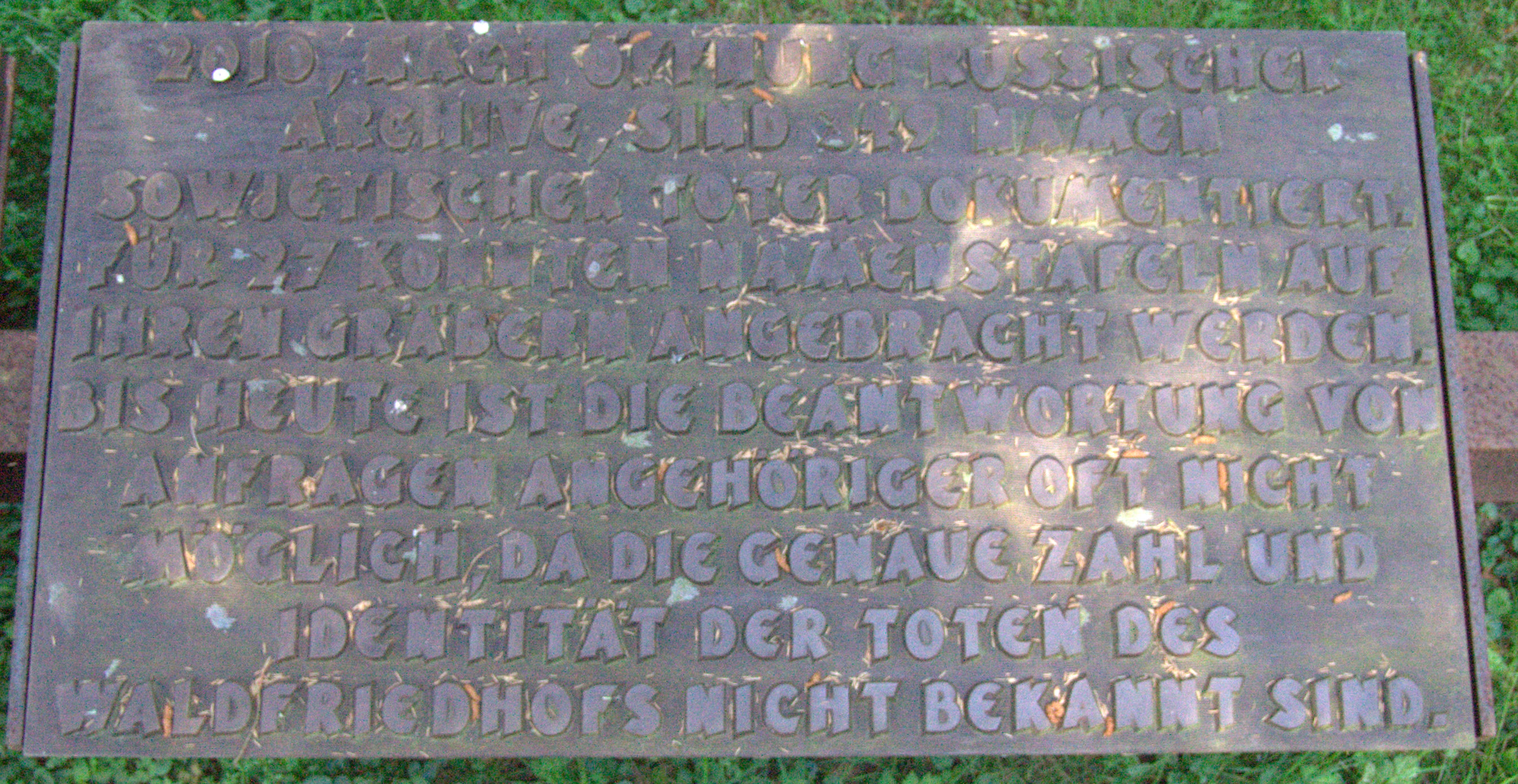 Gedenktafeln für die Ehrung der verstorbenen des Kriegsgefangenenlagers Stalag IX A Ziegenhain